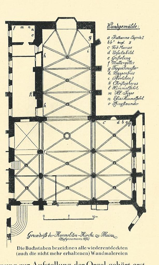 Grundriss der Karmeliterkirche Mainz aufgenommen 1876 Basilika bestehend aus einem dreischiffigem, dreijochigem Langhaus und einschiffigem, zweijochigen Chor. Langhaus und Chor waren ursprünglich durch einen Lettner getrennt.